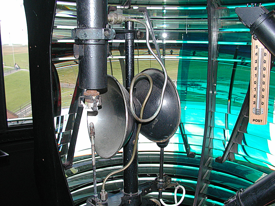 Gas Notlicht (links) Leuchtturm Dicke Berta, Cuxhaven